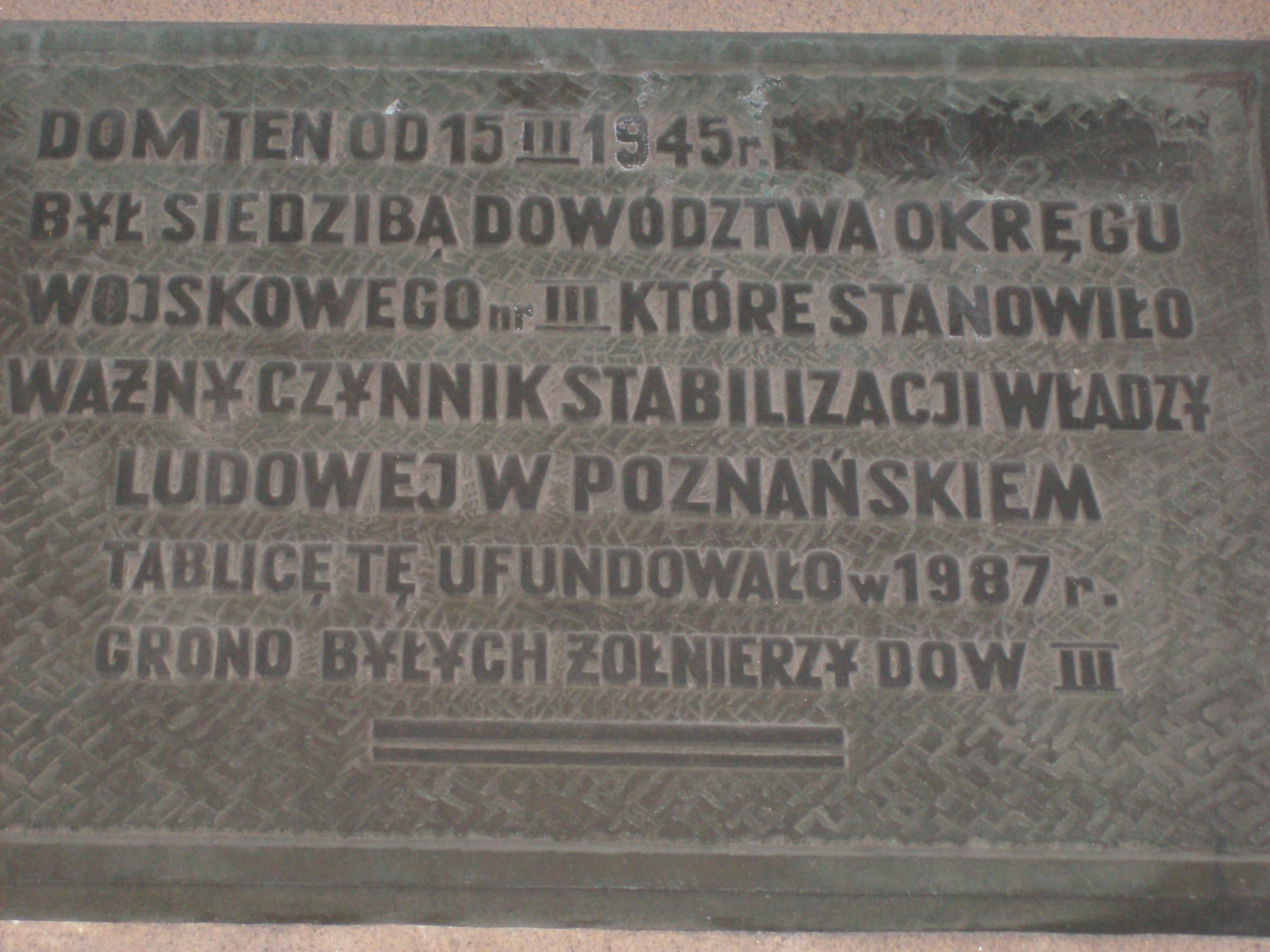 Poznań, ul. Matejki 61 / Grottgera 1 - kamienica, w l. 1945-1949 siedziba Poznańskiego Okręgu Wojskowego (zabytek nr A 382)